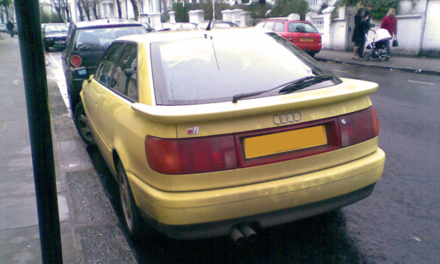 Audi S2